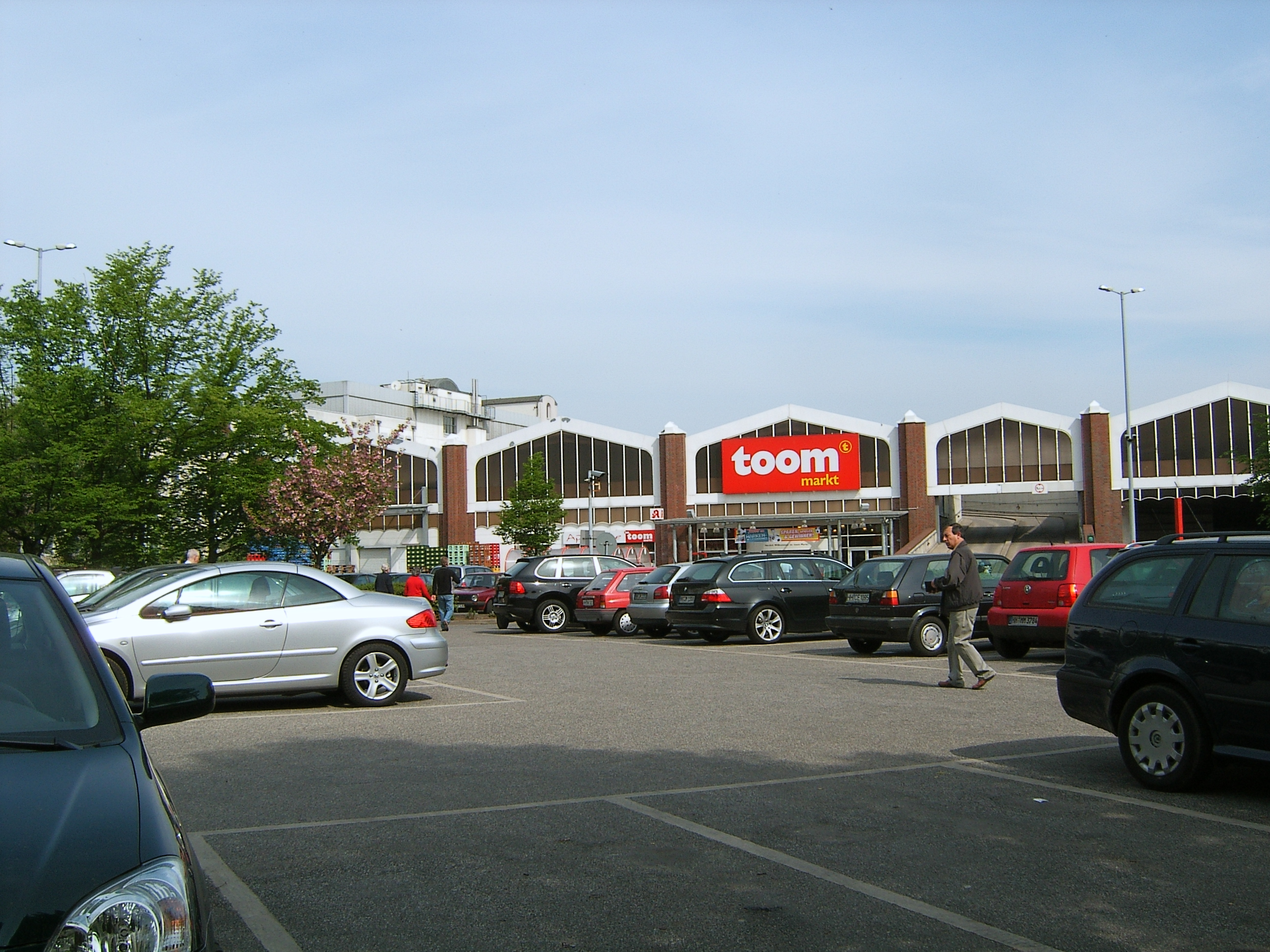 Toom-Markt in Altona-Altstadt auf dem Gelände des ehemaligen Straßenbahnbetriebshofes.